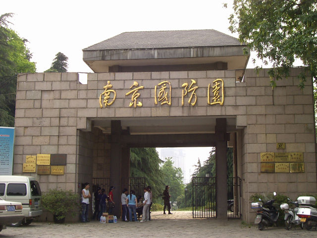 国防園 入口 2004年5月22日撮影 撮影者：権作 参照：